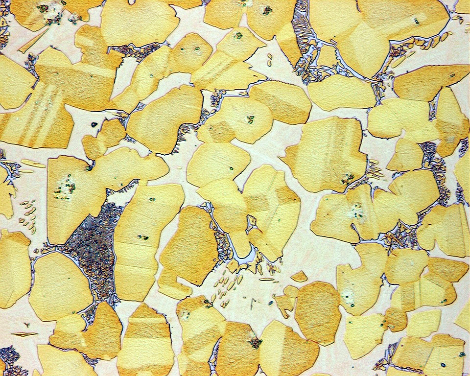 Aluminiumbronze, 20% Aluminium, geätzt mit Kupfer-Ammonchlorid, V=500:1